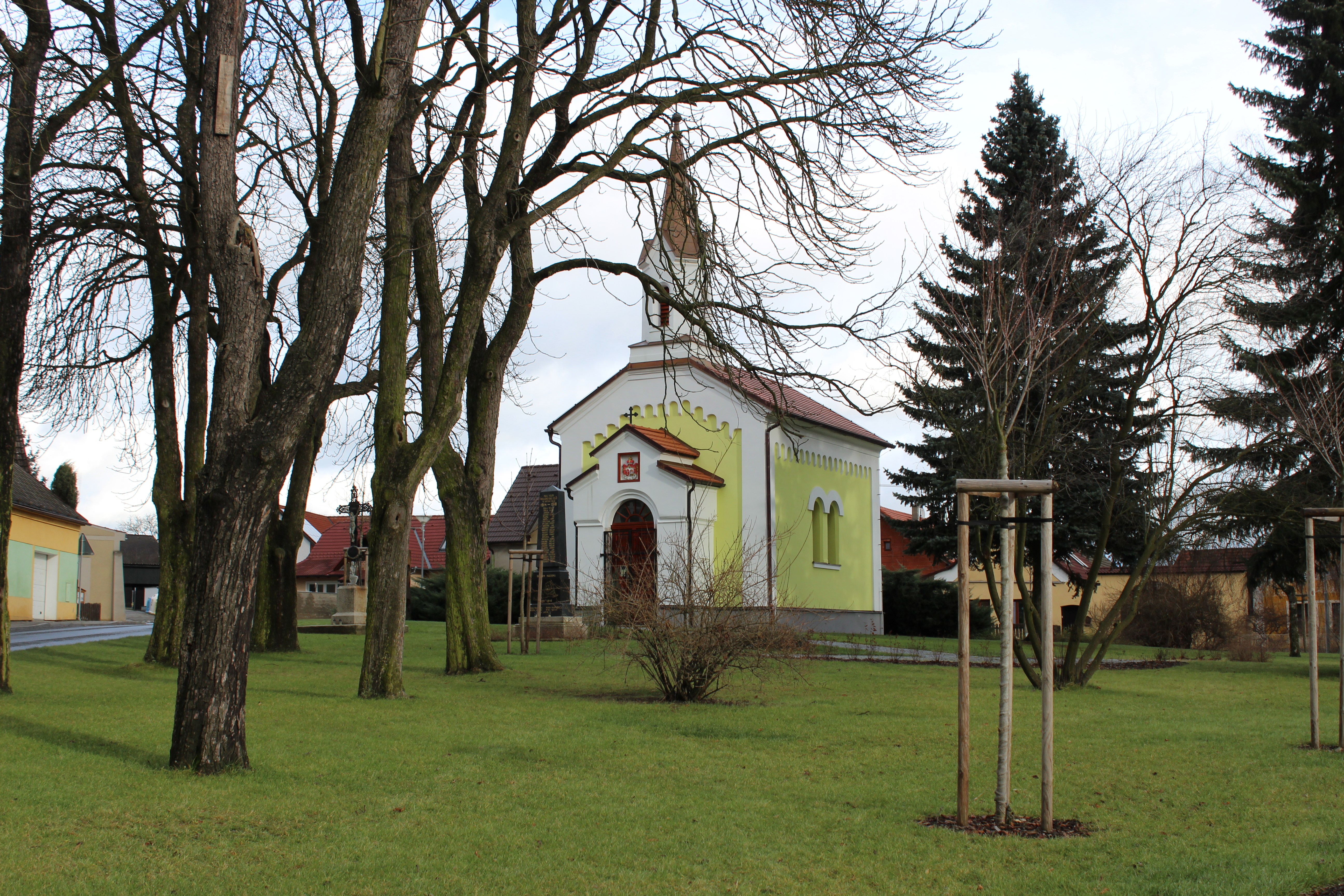 Místní kaple v parku. Želeč (okres Tábor). Česká republika.